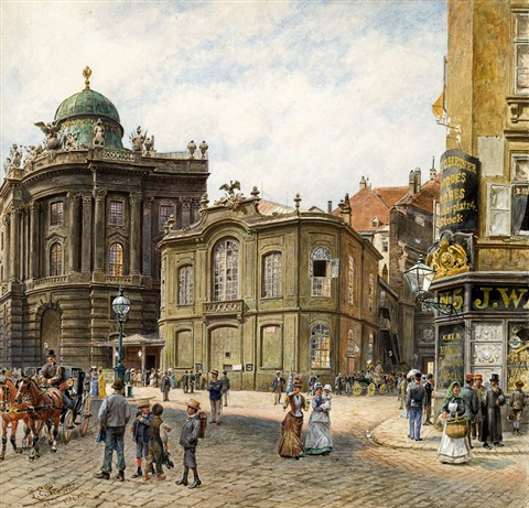 Das alte Burgtheater am Michaelerplatz in Wien